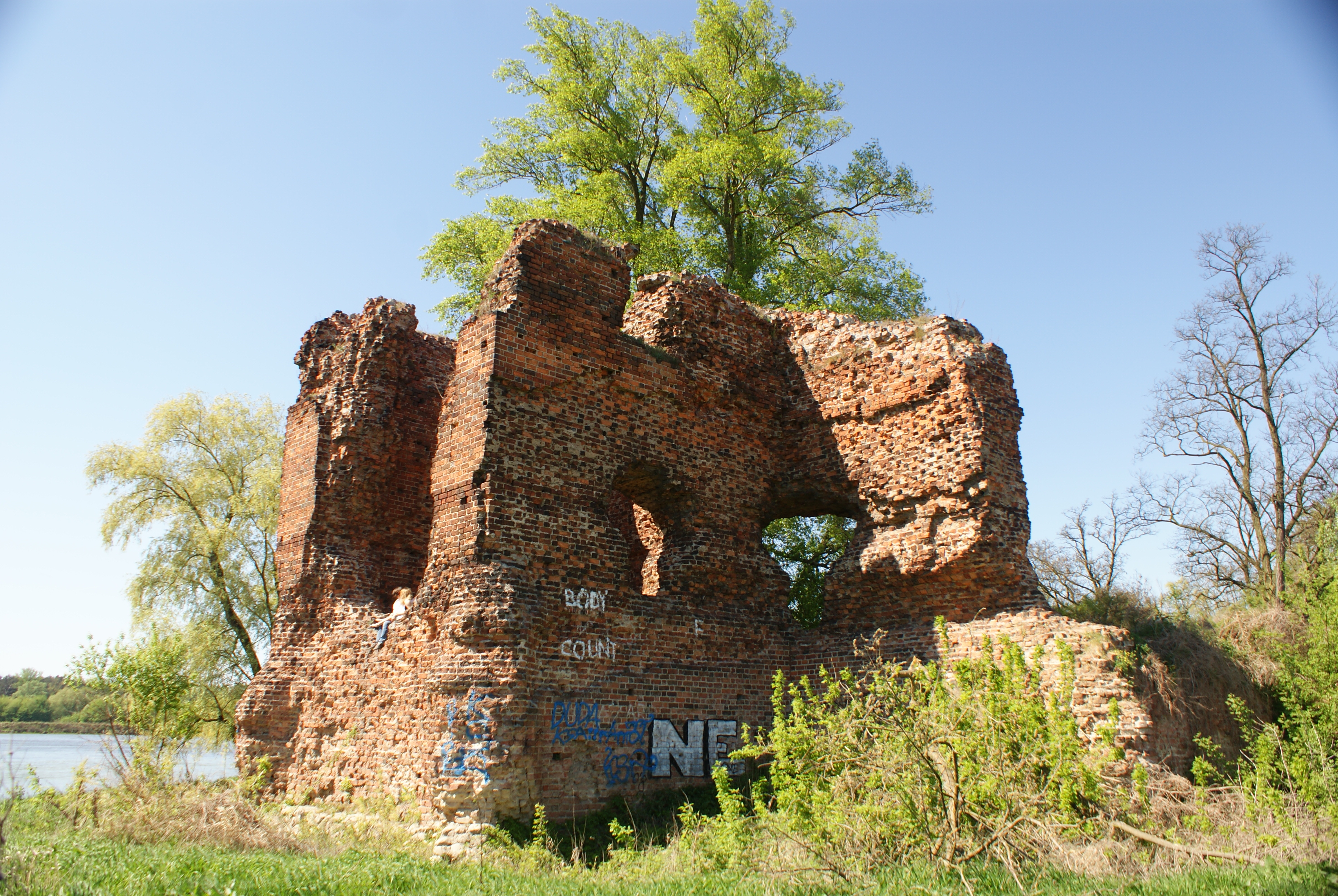 Ruiny zamku w Złotorii, elewacja północno-wschodnia